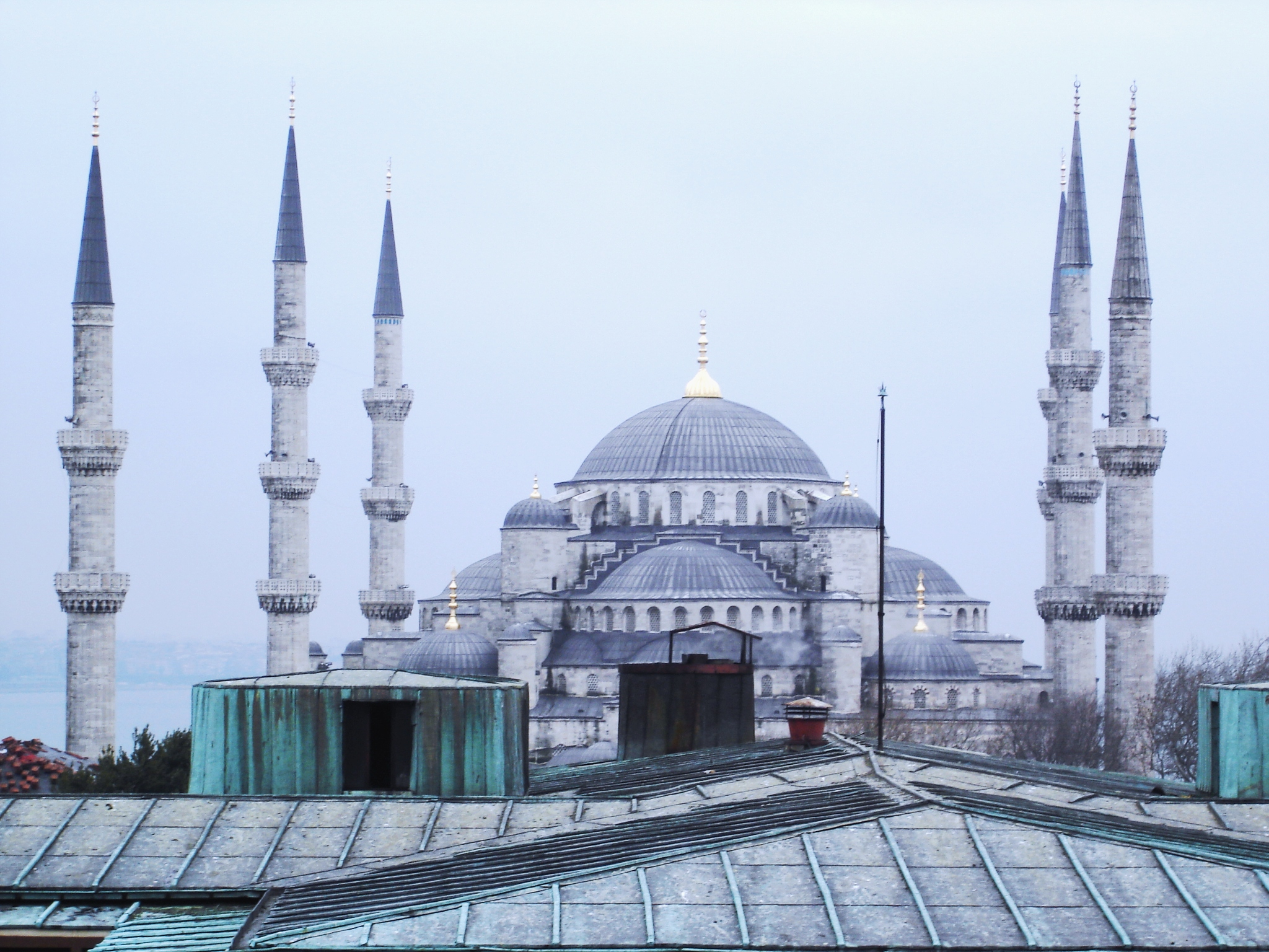 Blaue Moschee / Blue Mosque (Sultanahmet, Istanbul/TR)